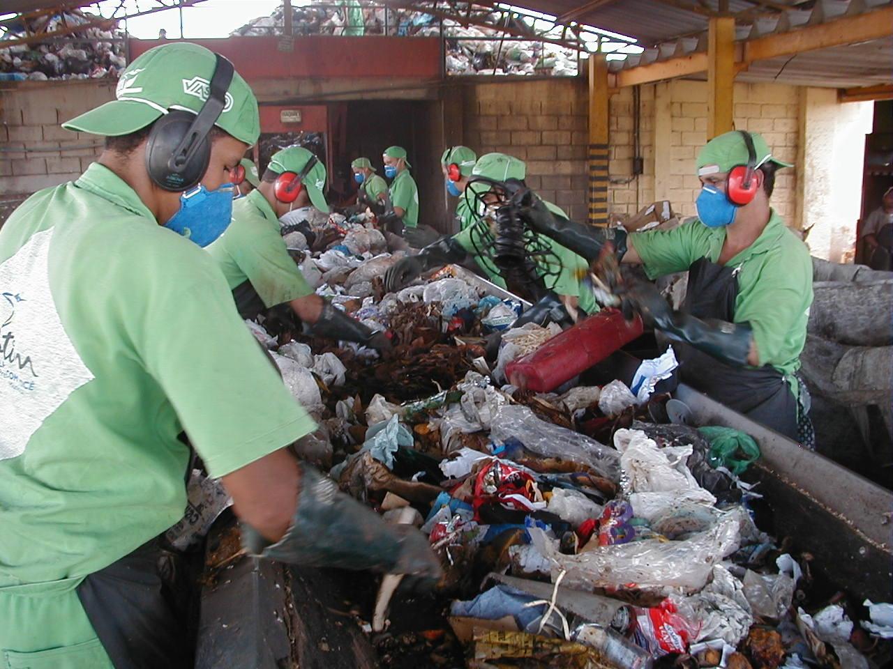 Triagem manual de lixo para reciclagem